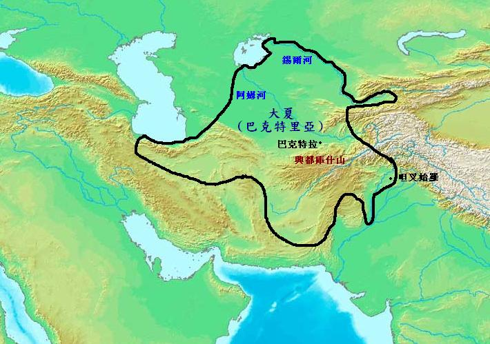 大夏的最大版圖。